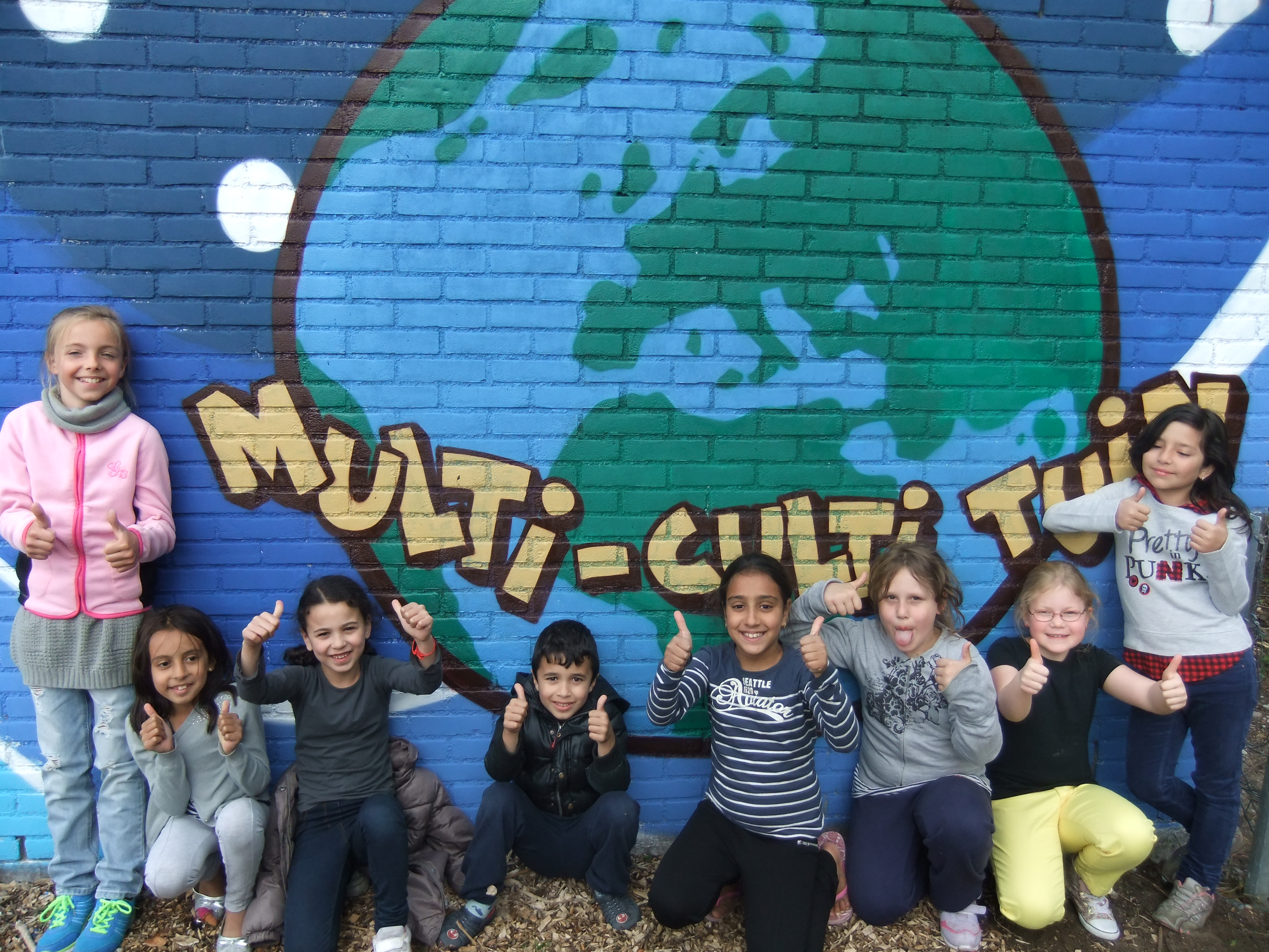 Kinderen op de Multi-Culti Tuin in Tiel